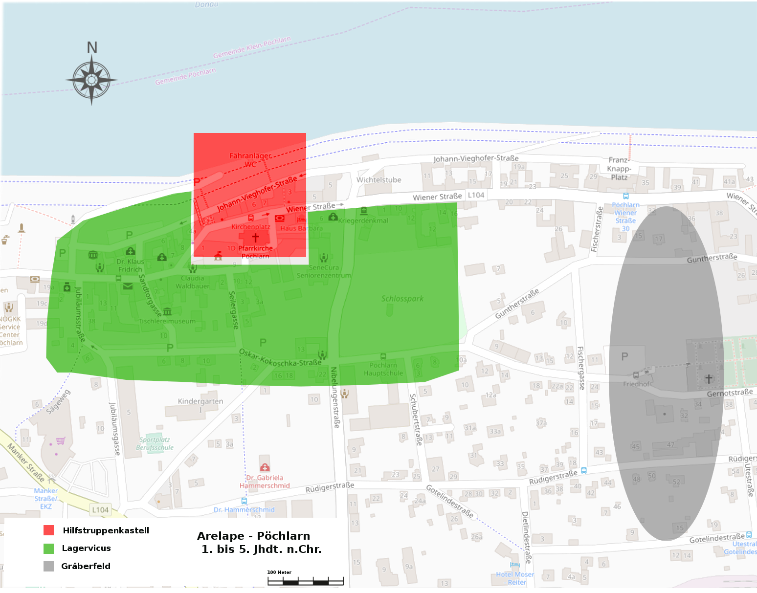 Römische Militär-, Siedlungsbefunde und. Gräberfelder in Arelape - Pöchlarn, 1. bis 5. Jhdt.n.Chr.